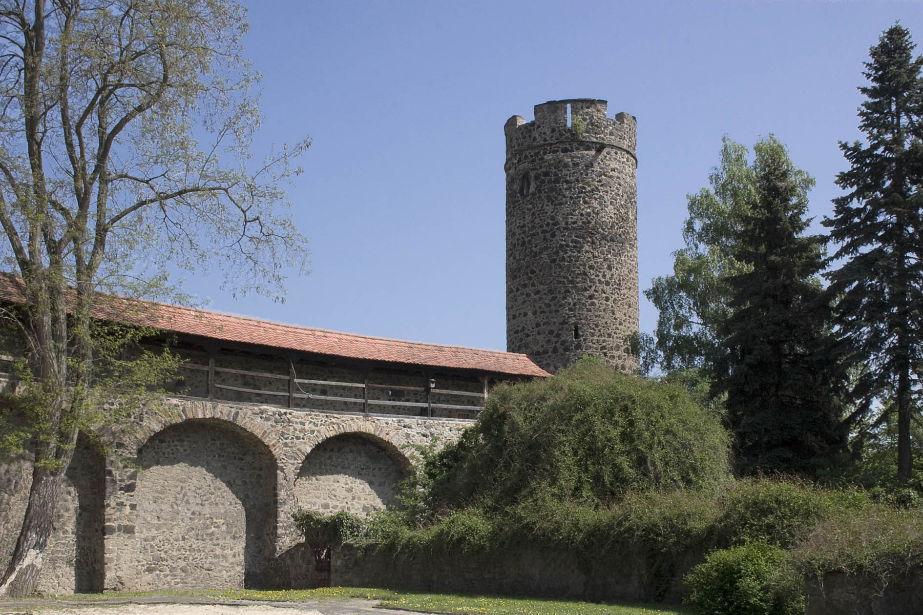 Hexenturm und Reste der Stadtmauer mit Schwibbögen, Butzbach in Hessen, Deutschland